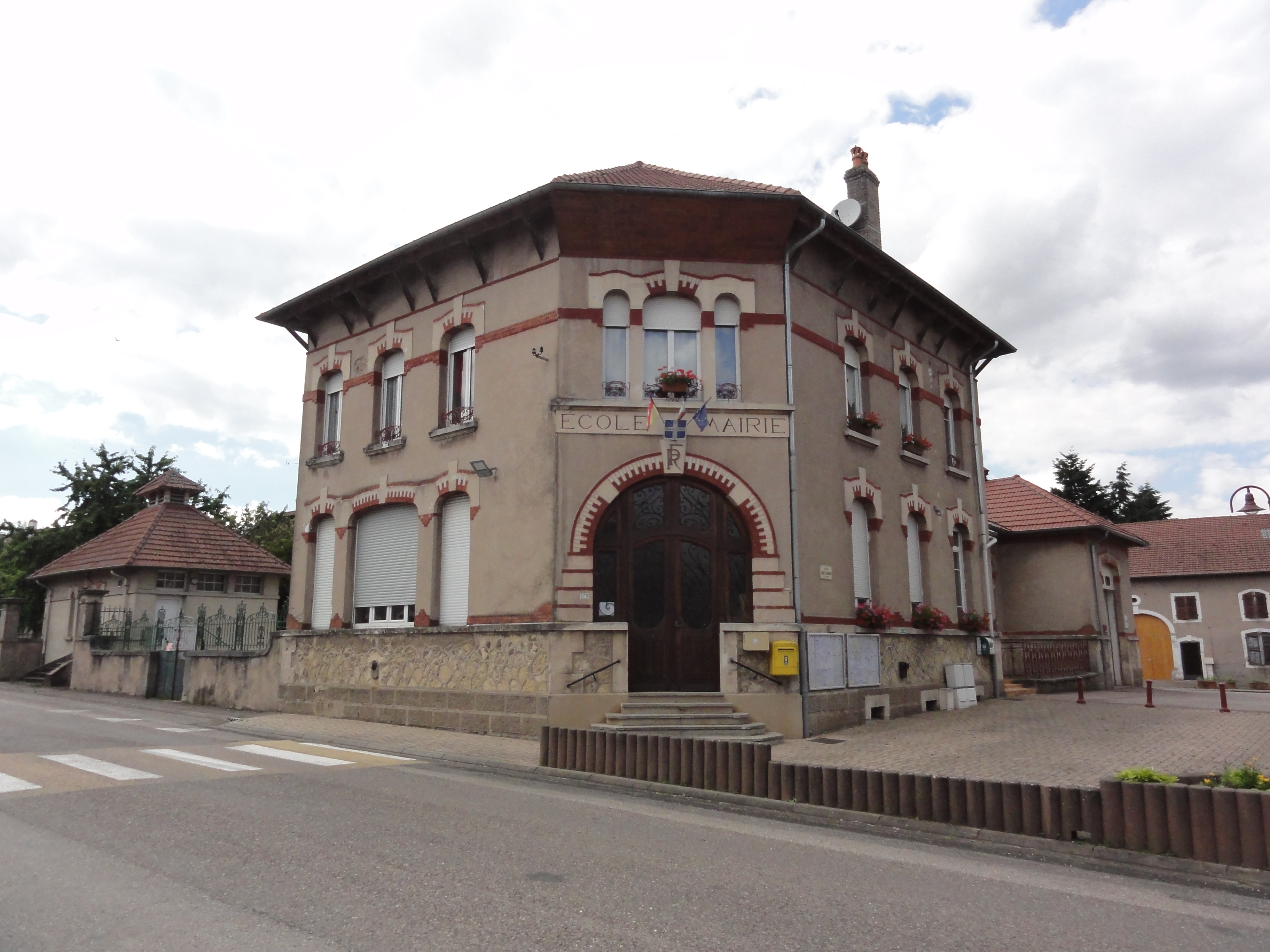 Herbéviller (M-et-M) mairie - école